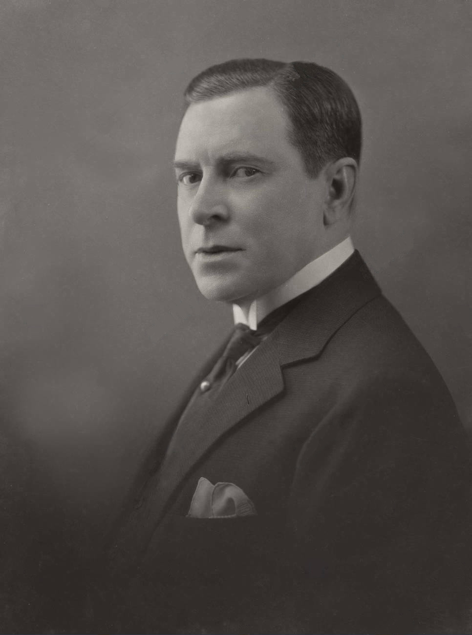 François Coty photographié par André Taponier (vers 1926).